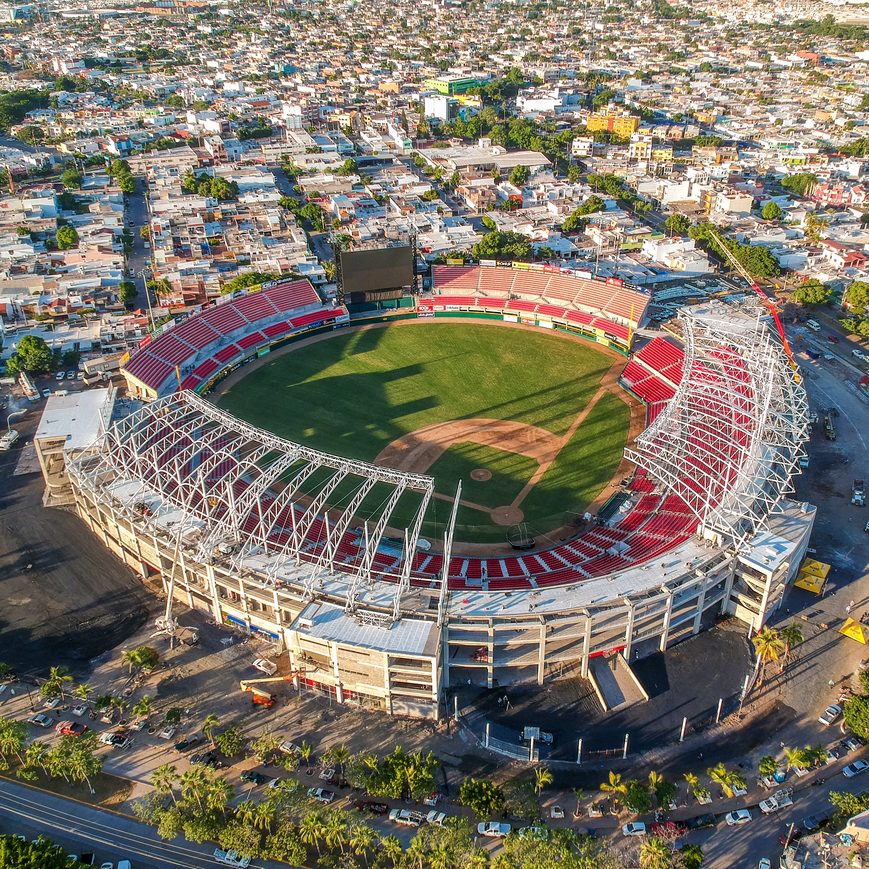 Así lucía el estadio en el dia del juego inaugural en Mazatlán